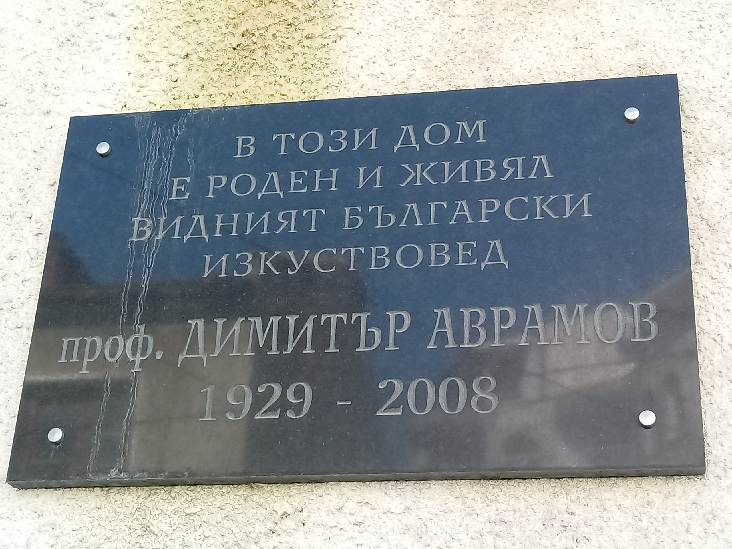 Dimitar Avramov memorial plaque, 28 Morska Str., Burgas